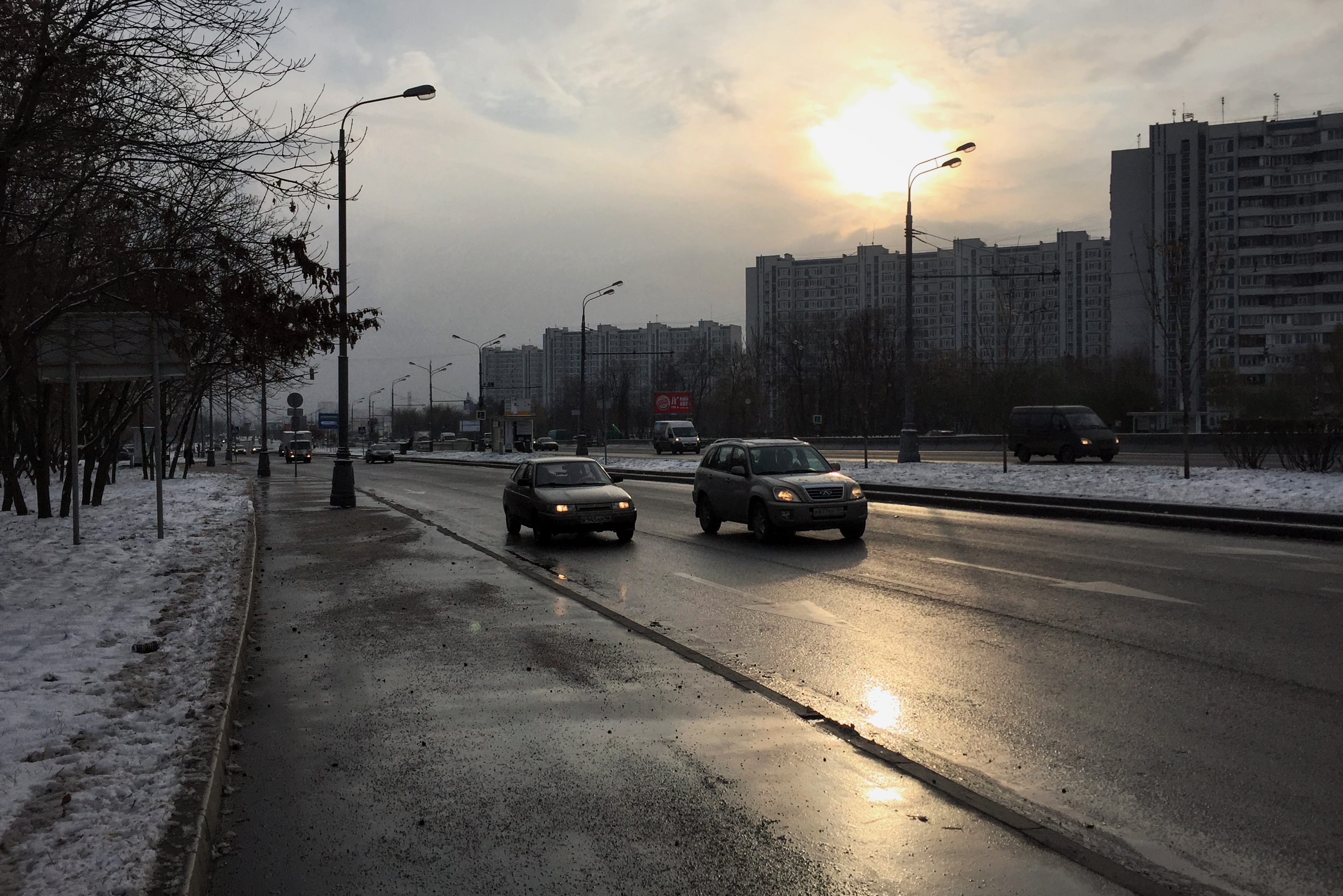 Варшавское шоссе Moscow in 2016; Москва в 2016